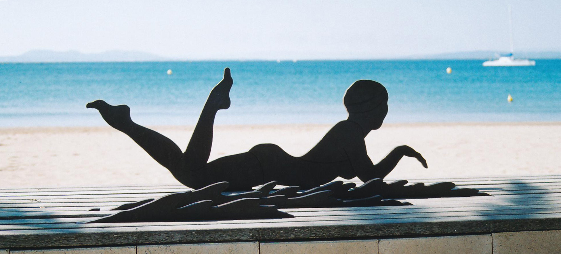 (Massive) Eisenskulptur am Strand von Roses Datum: 04/2006 Urheber: Michael Pfeiffer Quelle: privates Fotoalbum des Urhebers